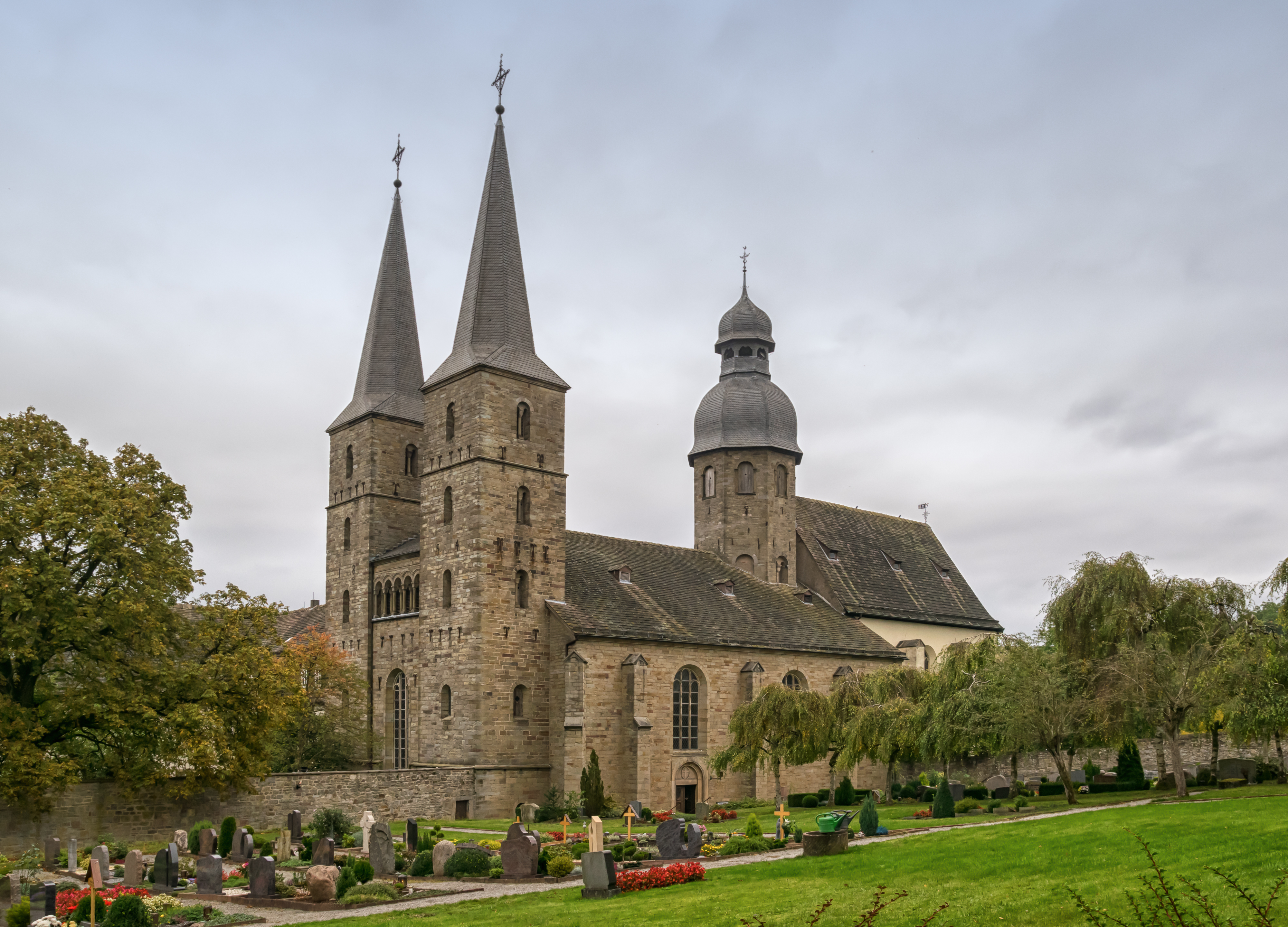 Abtei Marienmünster in Marienmünster, Kreis Höxter; Abteikirche und Friedhof